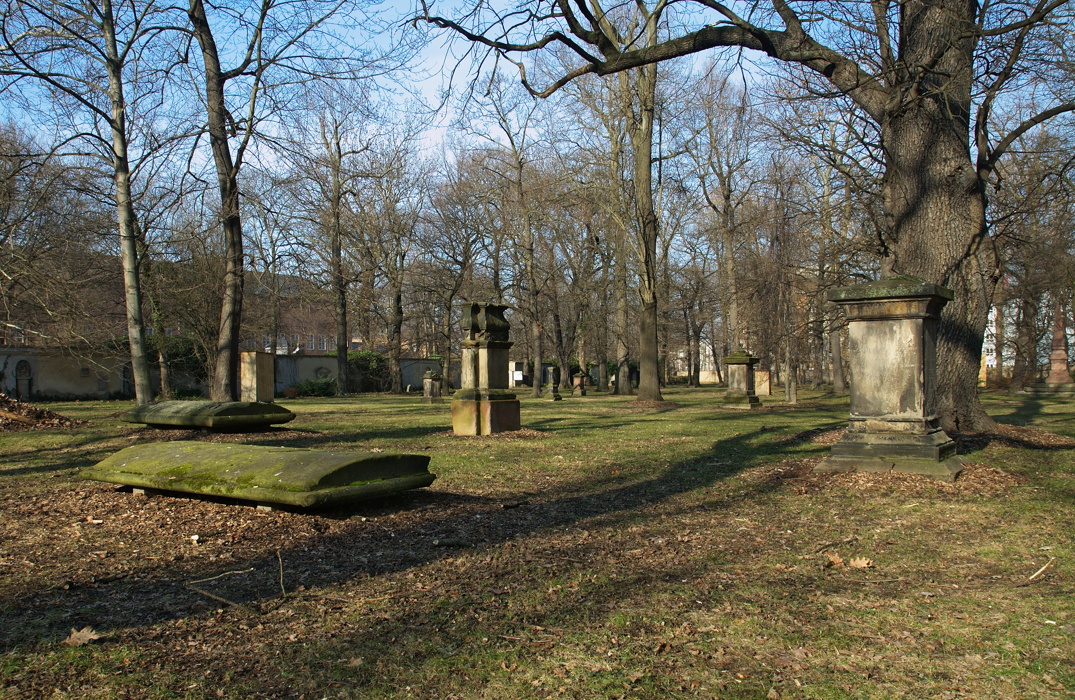 Ansicht des alten Johannisfriedhofes, Leipzig 2011.